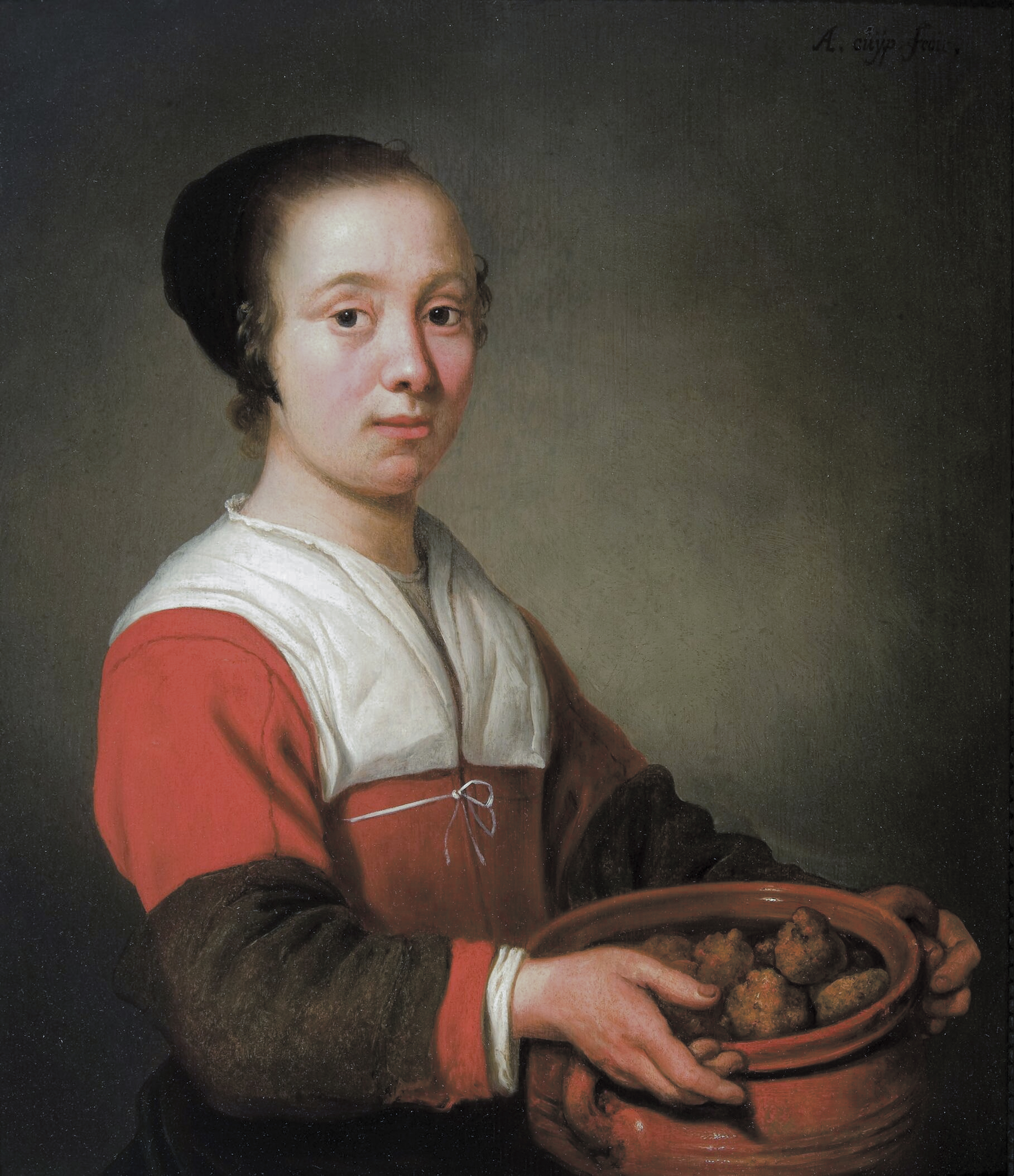 Jonge vrouw met een kookpot vol oliebollen oil on panel 40 x 34 cm ca 1652 inscribed u.r.: A.cuyp. Fecit